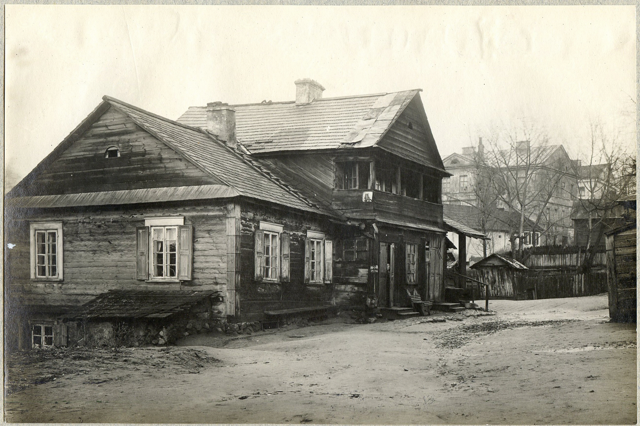 Беларуская (тарашкевіца): Менск (Miensk), флігель палаца Ваньковічаў на Валоках Полацкіх (Vałoki Połackija)